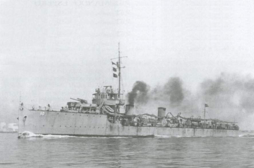 CT Mato Grosso (CT-10), navio tipo contratorpedeiro da Marinha do Brasil. Estaleiro: Yarrow Shipbuilders